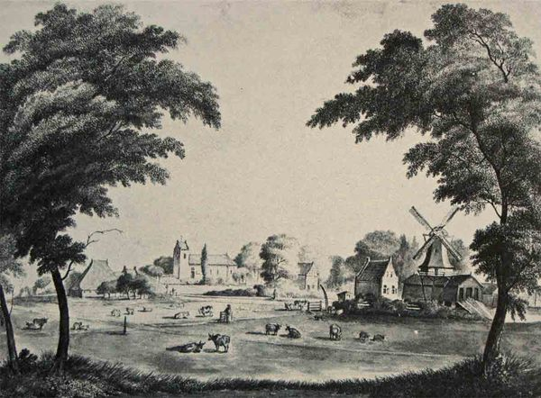 Mockemstate en Holdingstate in Aalsum bij Dokkum begin 19e eeuw